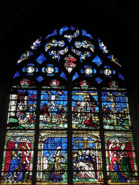 Vitrail de la compassion de la Vierge. Collégiale Notre-Dame-en-Vaux de Châlons-en-Champagne (51).